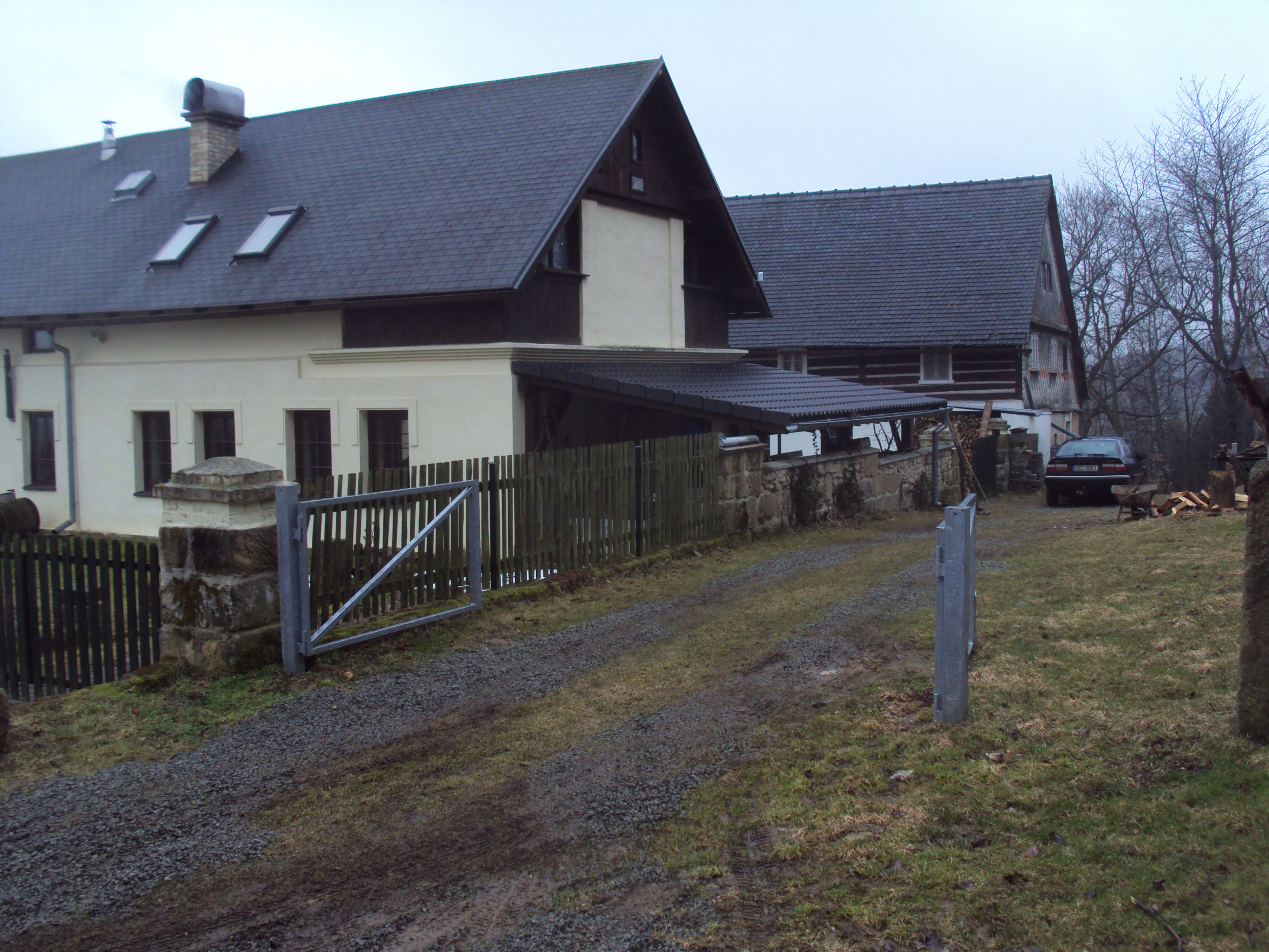 Osada Vlhošť pod stejnojmenou horou, část obce Blíževedly, katastr Litice